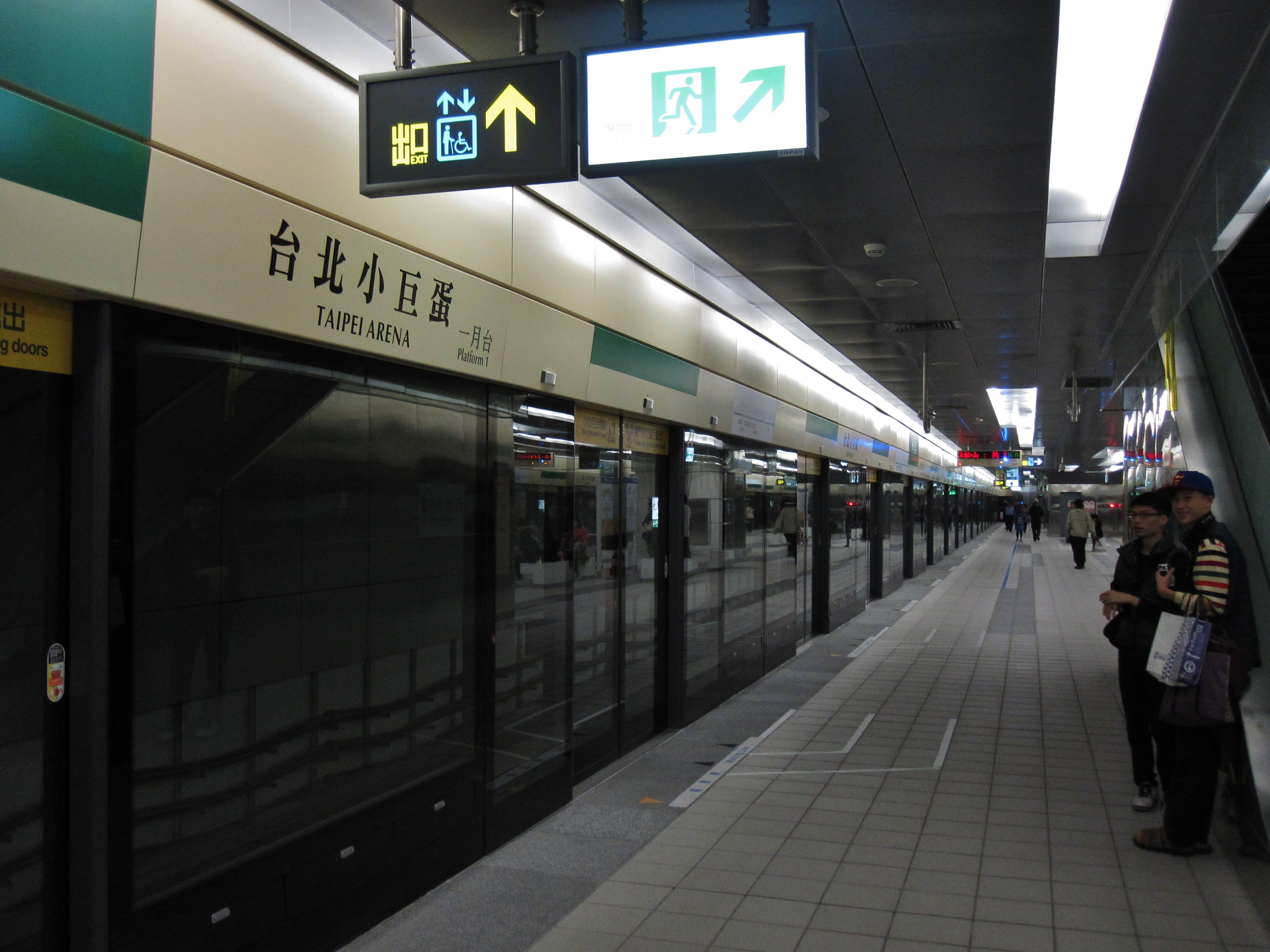 中文（台灣）: 台北捷運台北小巨蛋站一月台。